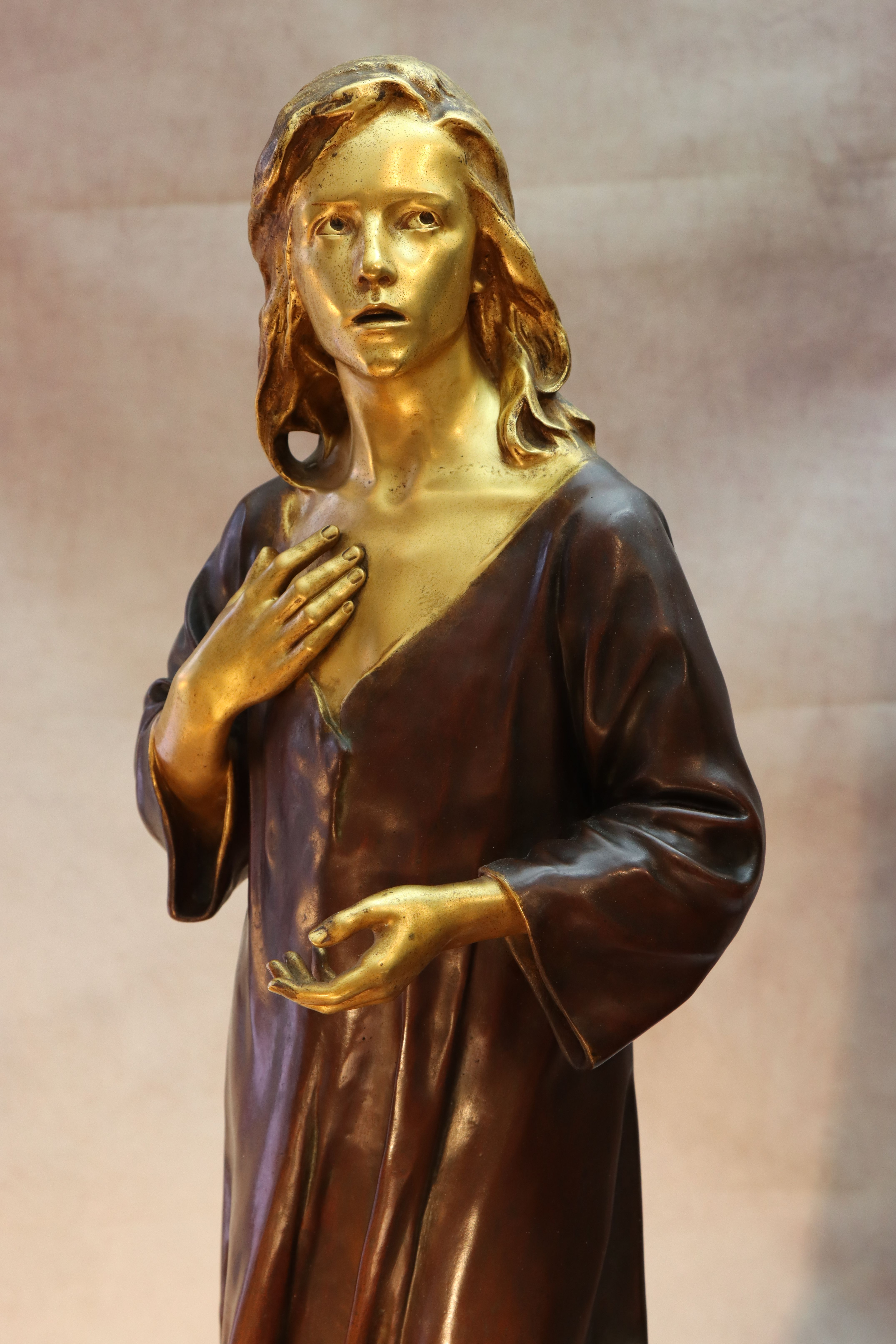 Statue de bronze du fondeur Siot-Decauville. 68 cm. Vers 1900.